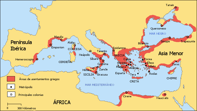 Mapa de los territorios y colonias de Grecia durante la Época Arcaica.